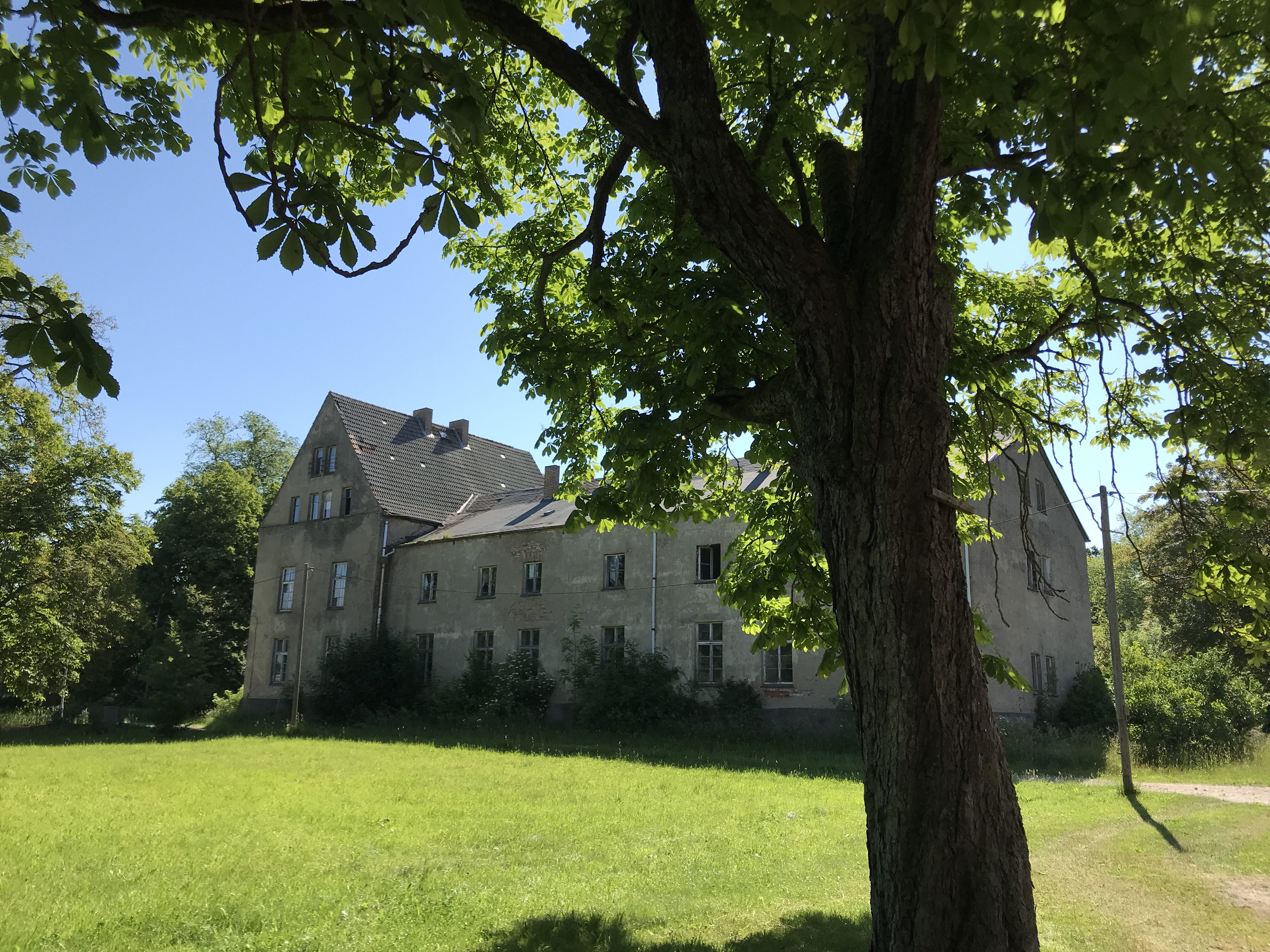 Altenhagen, ein Ortsteil der Gemeinde Velgast in Mecklenburg-Vorpommern